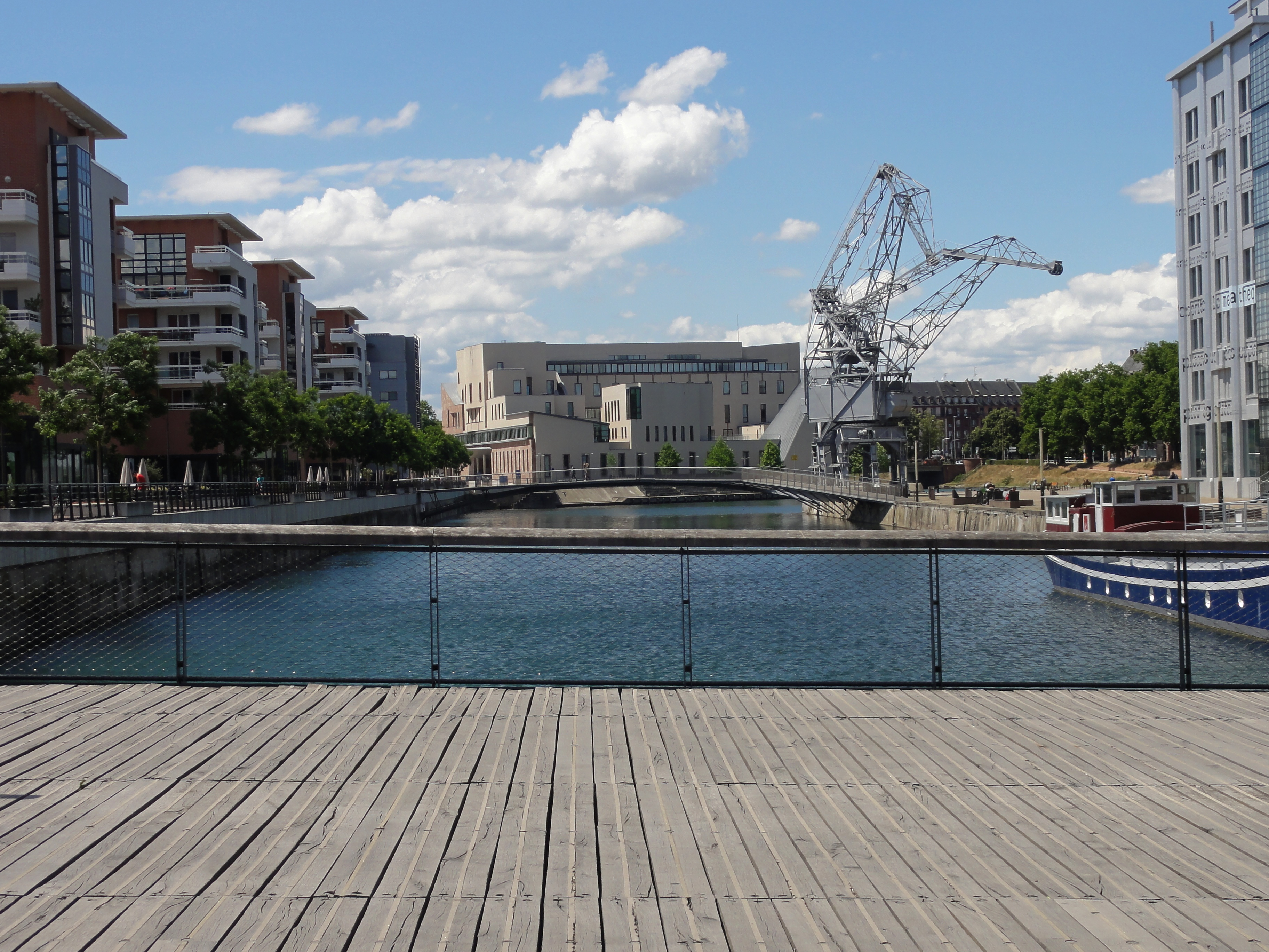 Alsace, Bas-Rhin, Strasbourg-Neudorf, Rivétoile, Quai Jeanne Helbling.